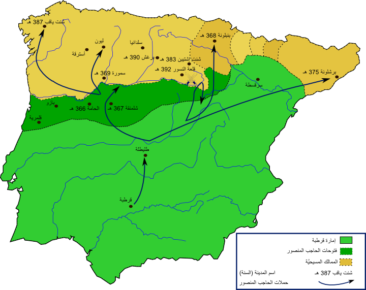 حملات الحاجب المنصور وفتوحاته في الأراضي المسيحيَّة الأيبيريَّة. الأخضر: خِلافة قُرطبة. الأخضر الداكن: فتوحات المنصور. الكاكي: الممالك المسيحيَّة.